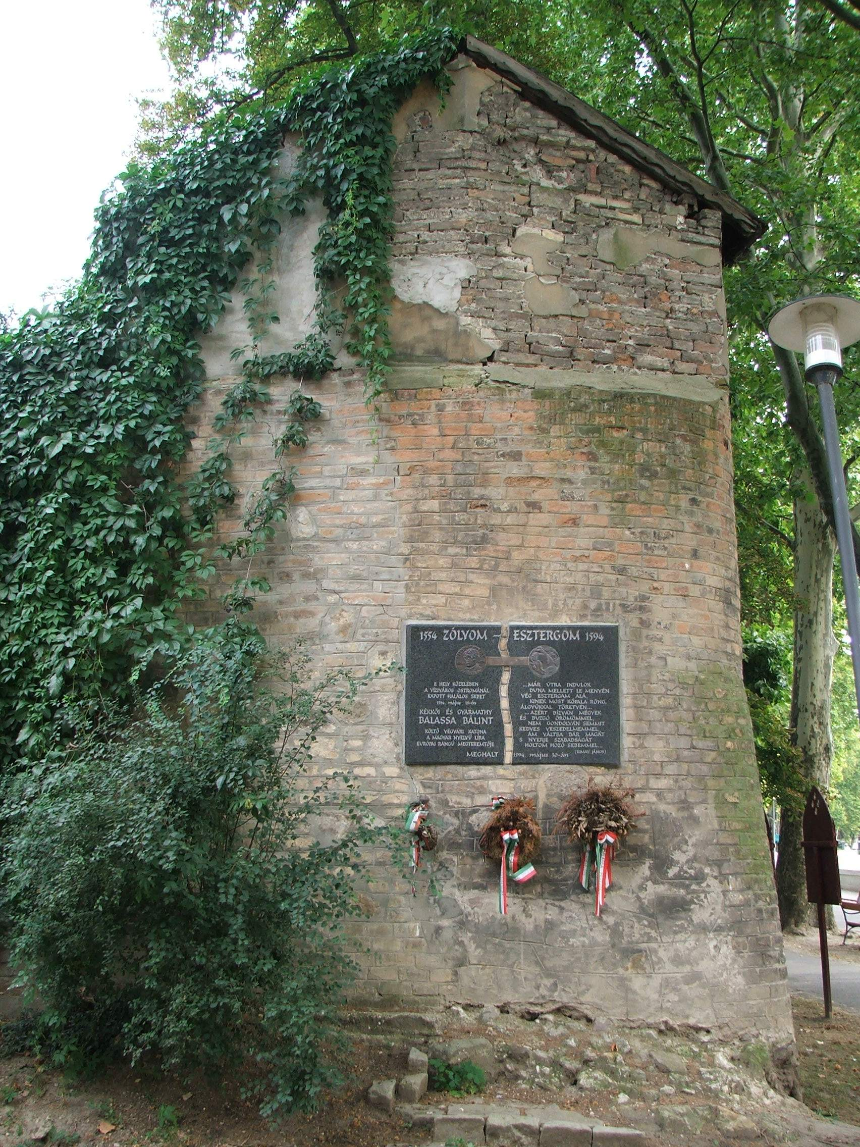 Balassa-emléktábla (Balassi Bálint, 1557–1594) a középkori falon